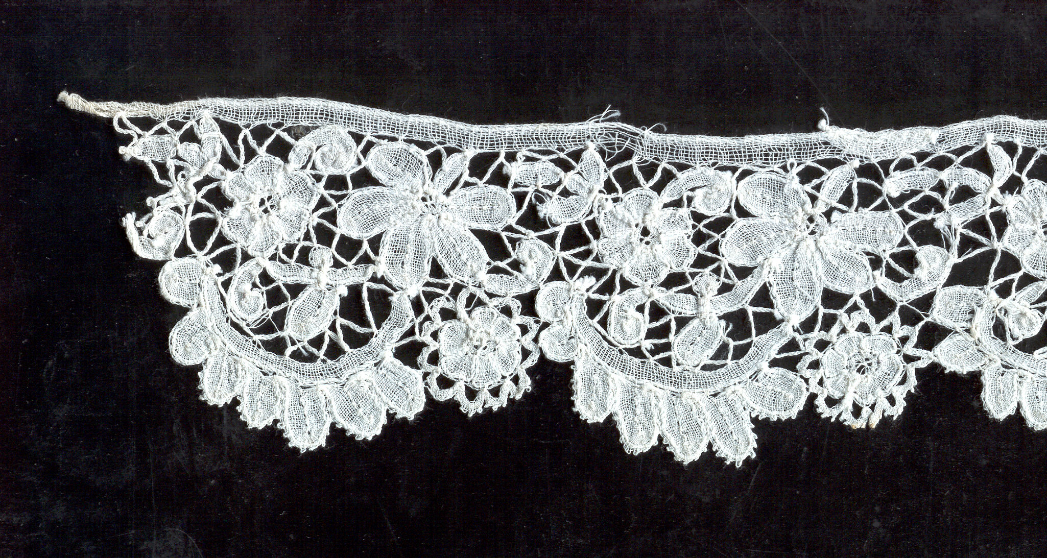 private collection